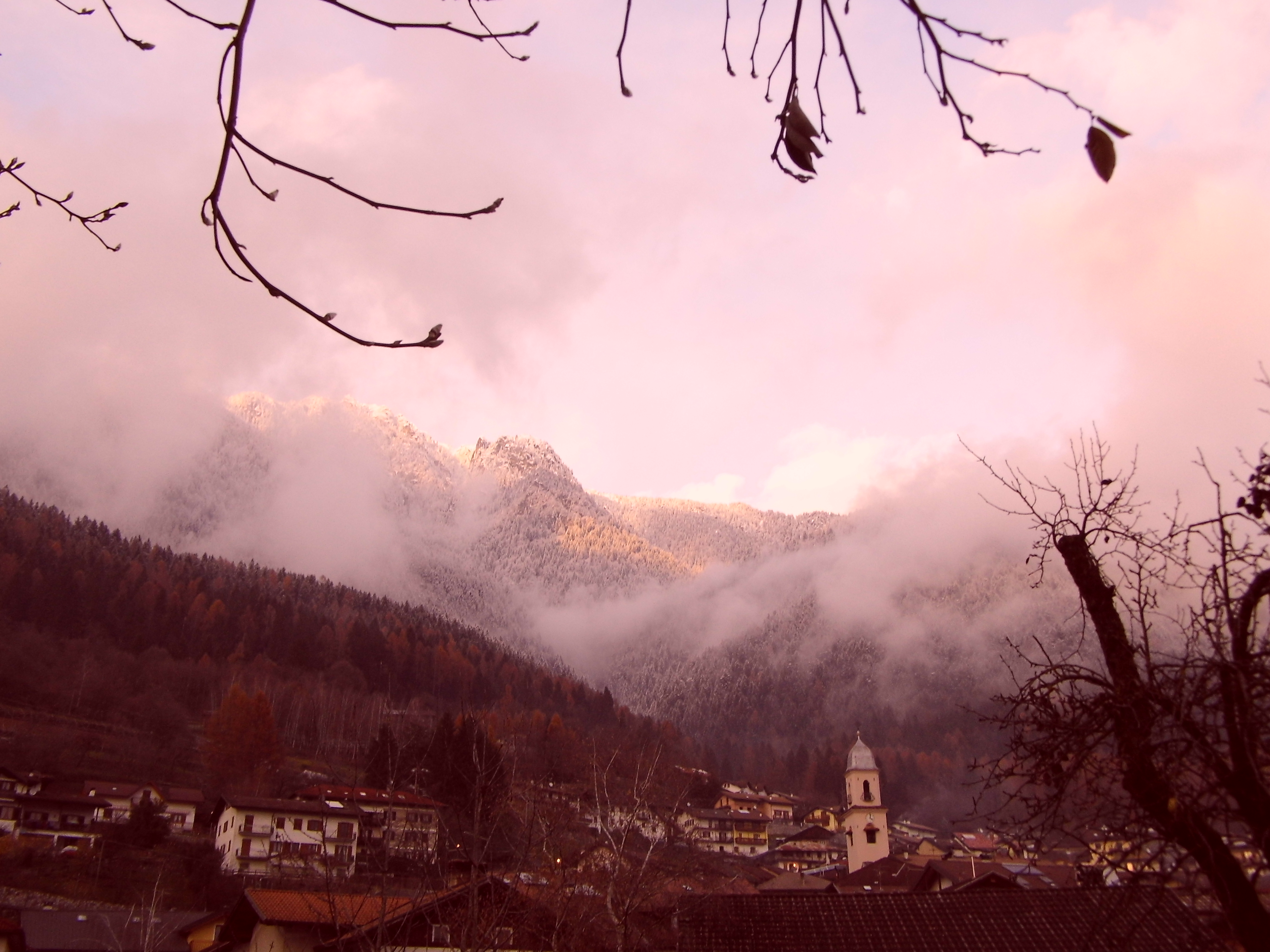 Scorcio di Samone (TN)